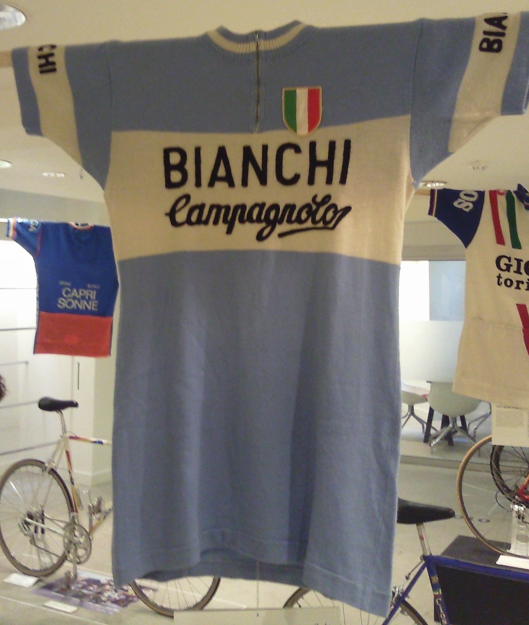 Bianchi jersey